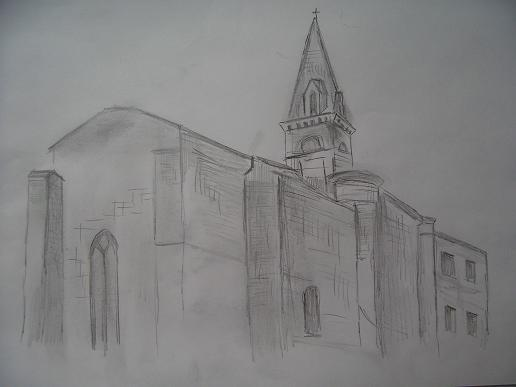 Skizze von Saint-Julien